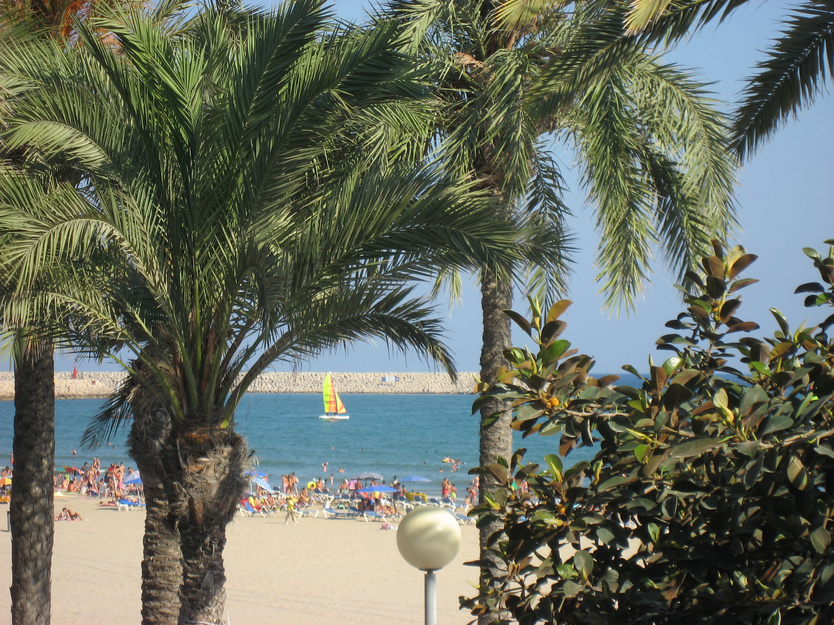 Vilanova I La Geltru Beachview 2007